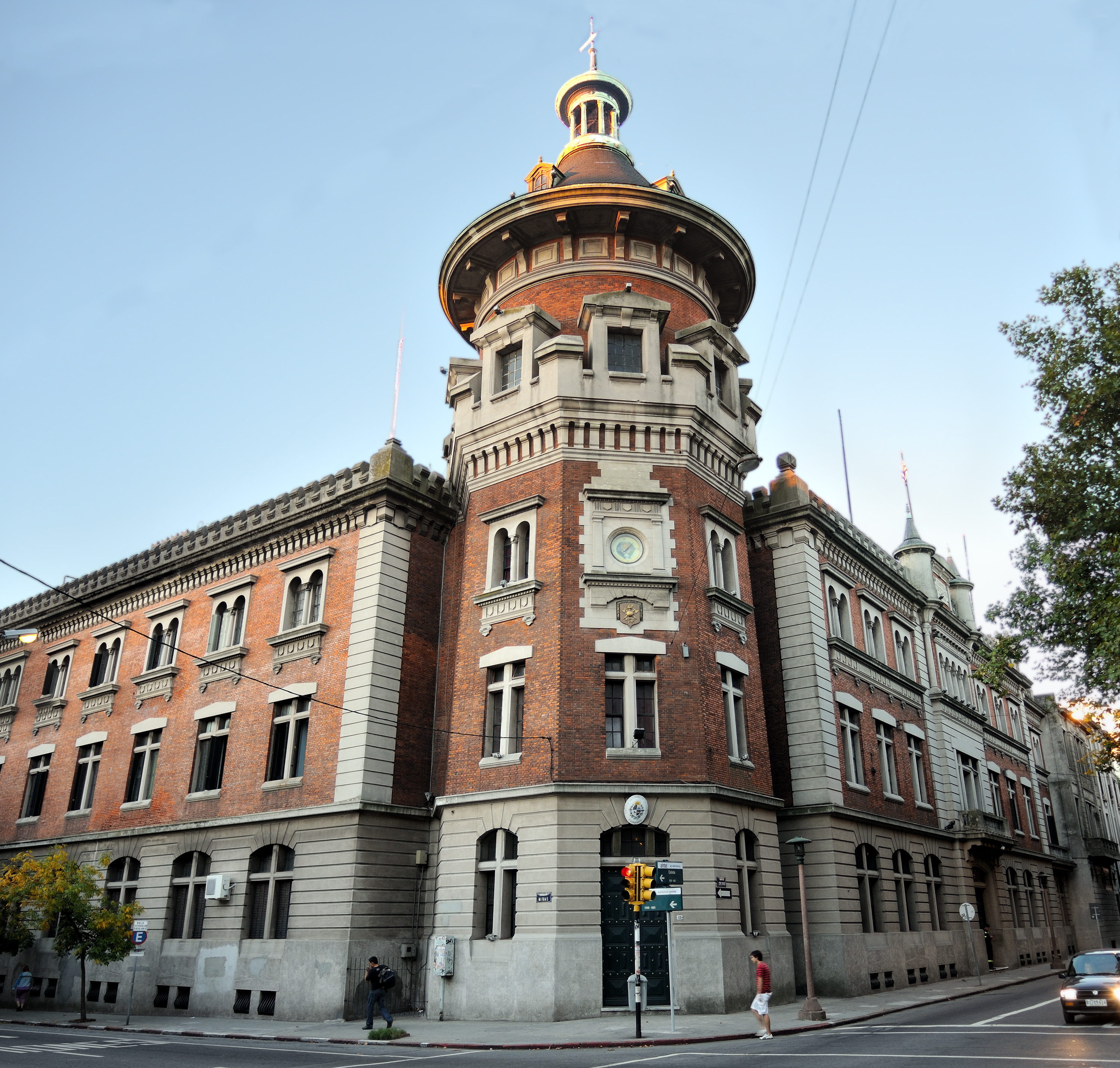 Cuartel Centenario sede de la Dirección Nacional de Bomberos, Montevideo, Uruguay